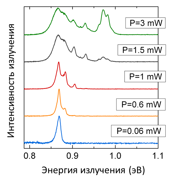 Спектр микро-фотолюминесценции квантовой точки при различных мощностях возбуждения